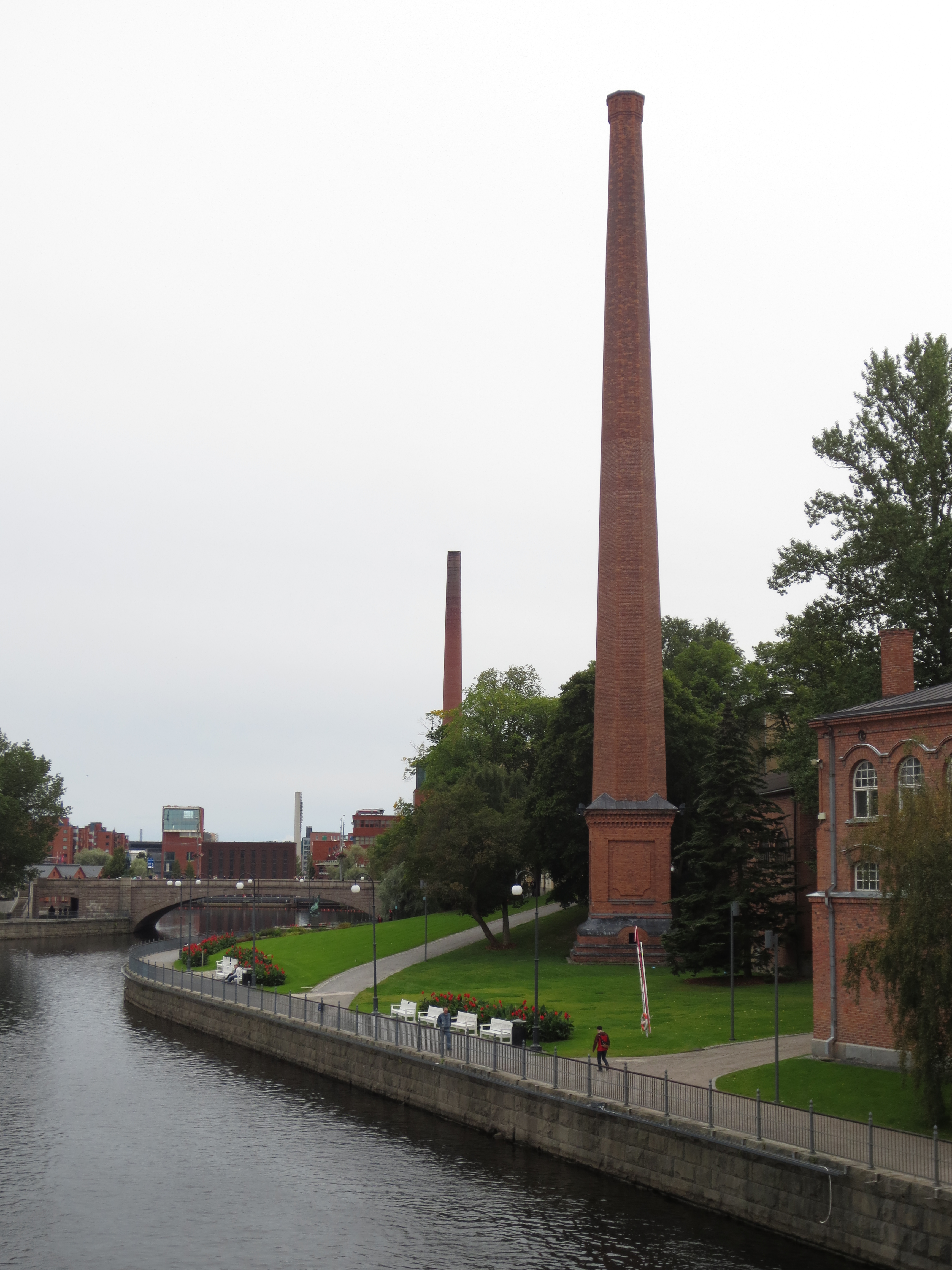 Kirjastonpuisto Tammerkosken rannalla, Tampere